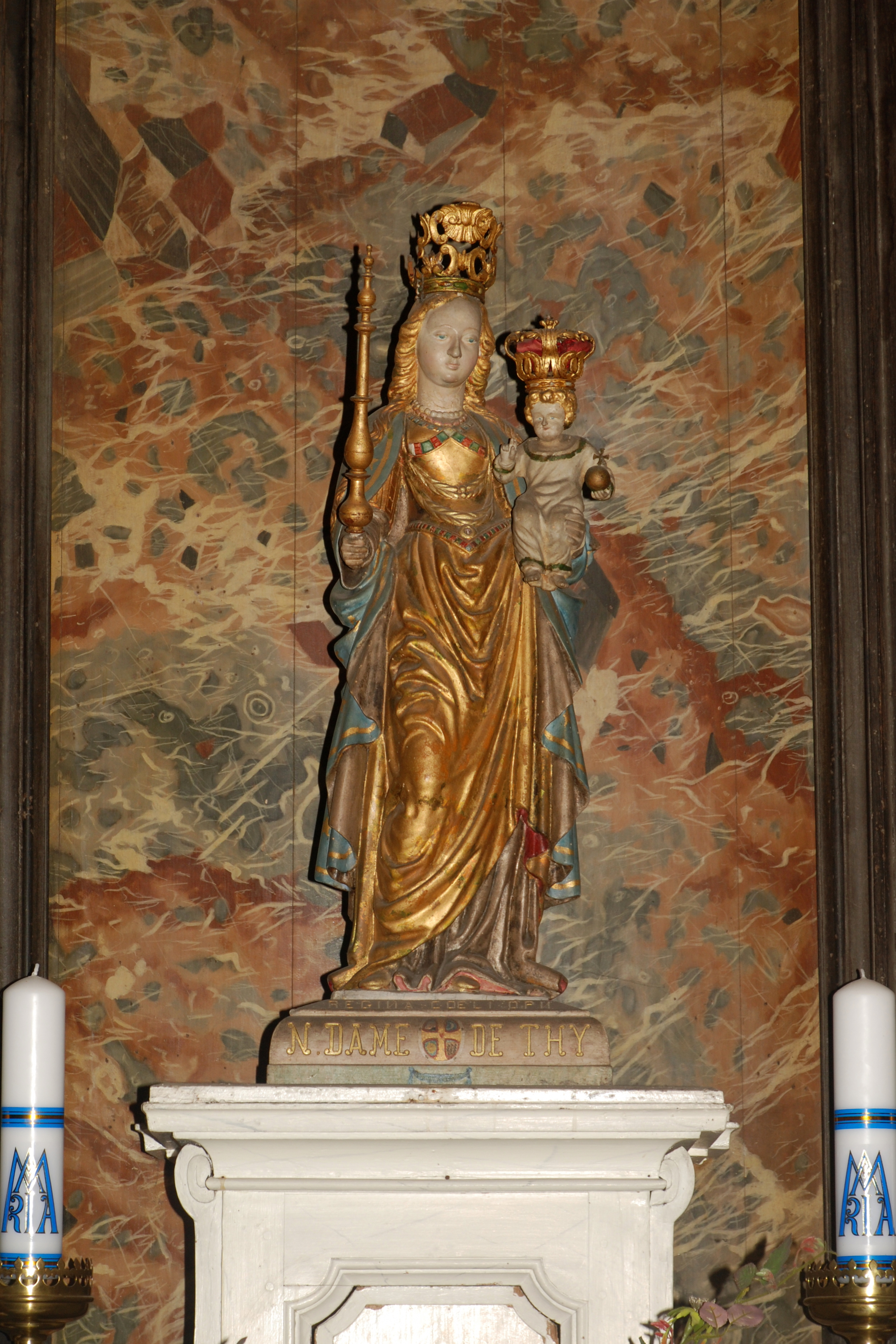 Belgique - Brabant wallon - Église Saint-Martin de Ways